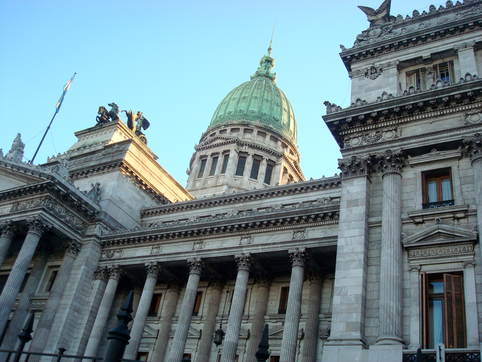 Congreso de la Nación Argentina